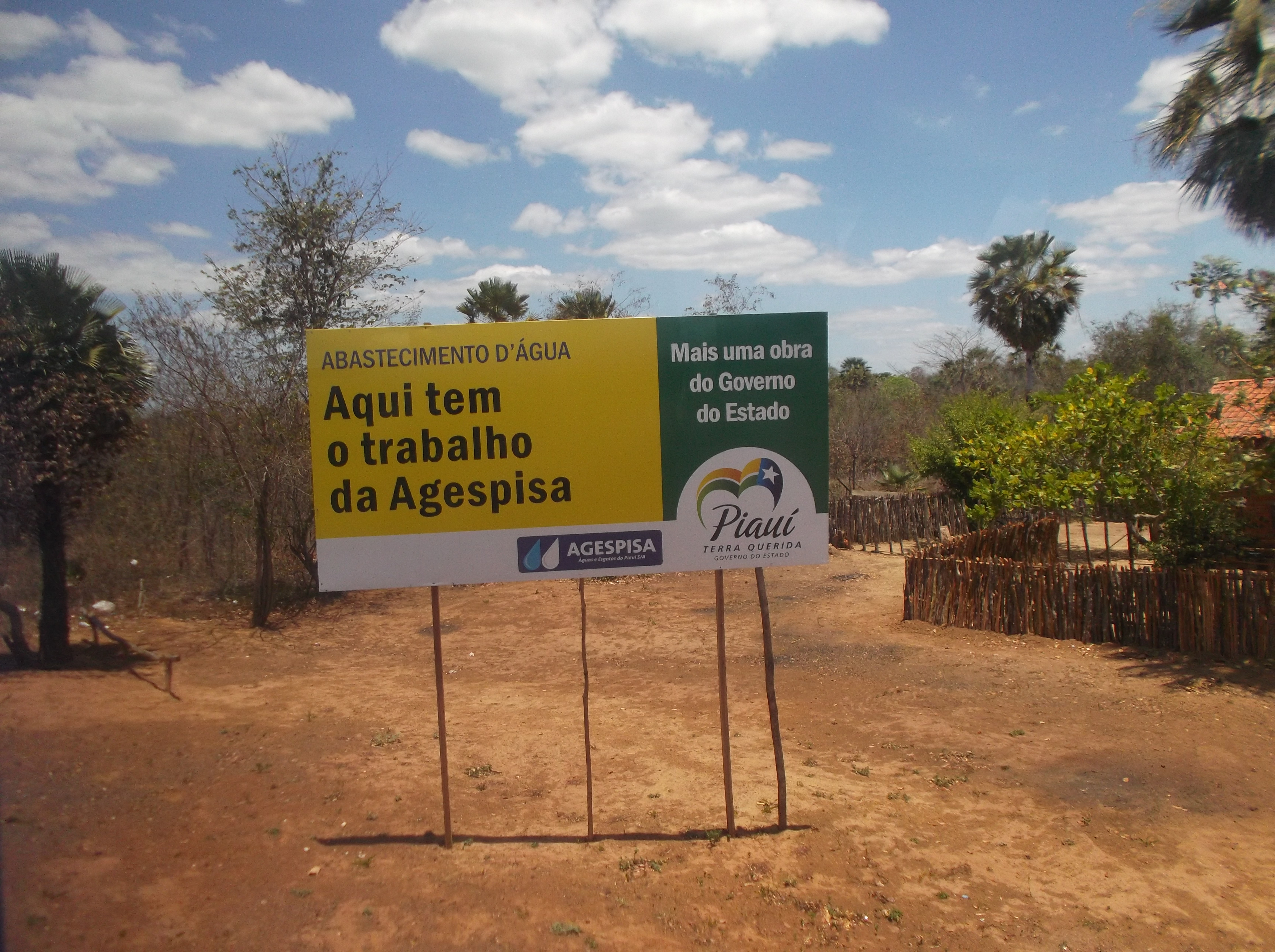 Placa de obras da AGESPISA, Águas e Esgotos do Piauí S. A.